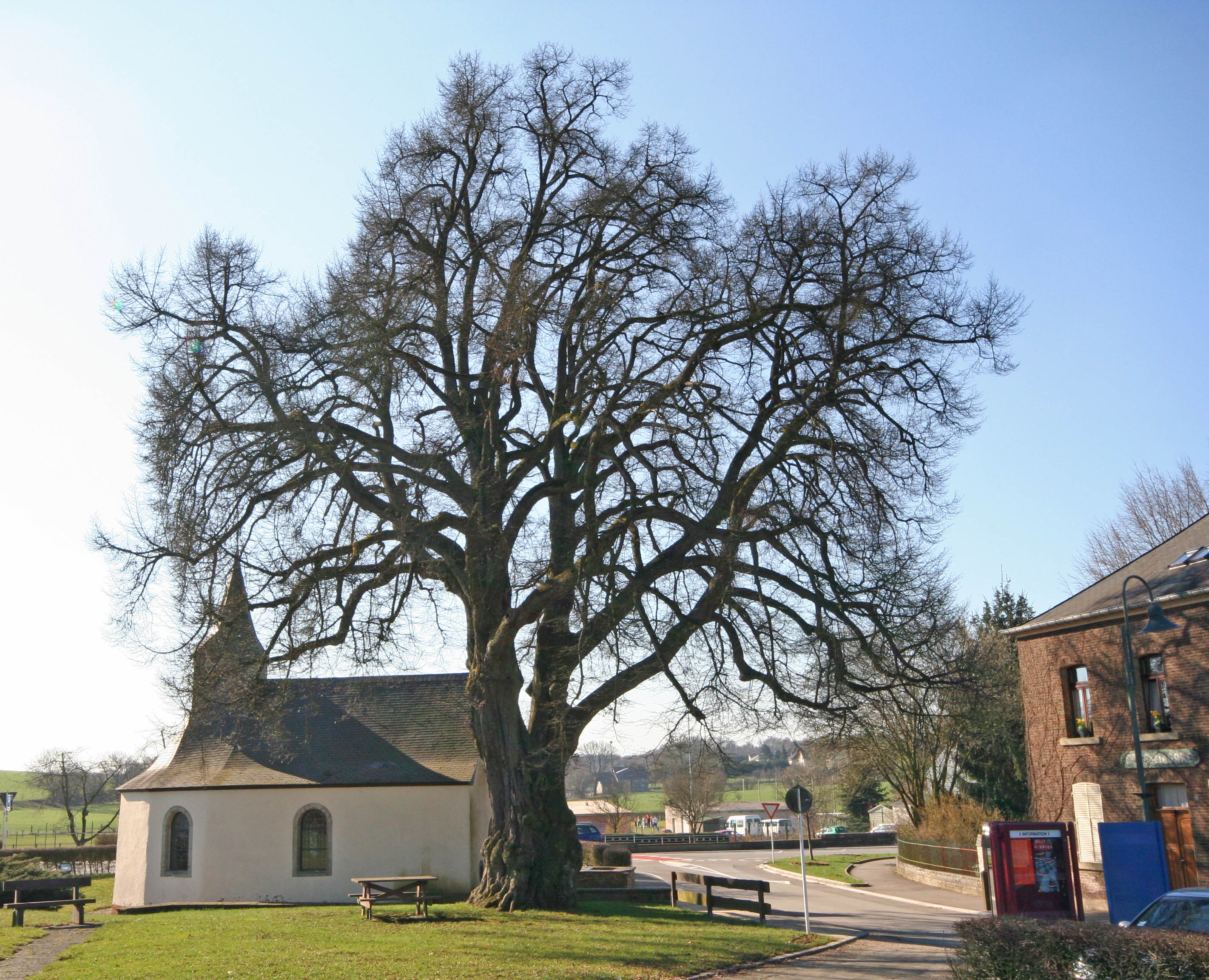 Wëll Lann. Lann Wëll Lann